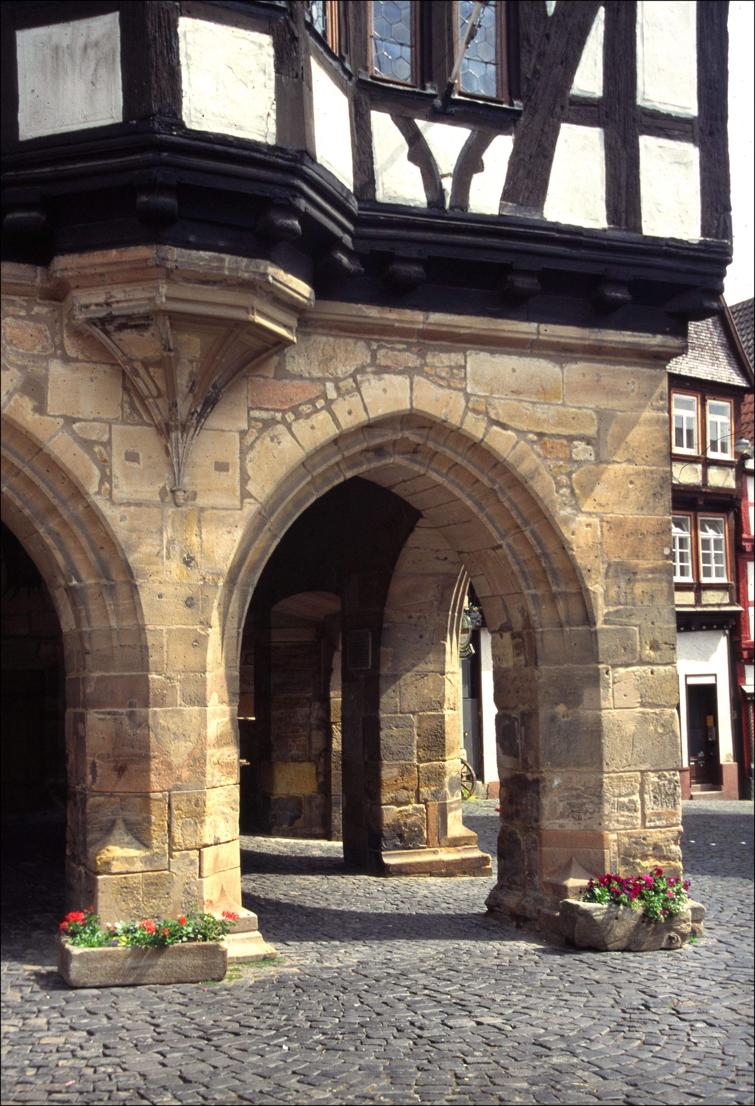 steinerner Unterbau mit deutlich abgesetzem Fachwerk-Aufbau